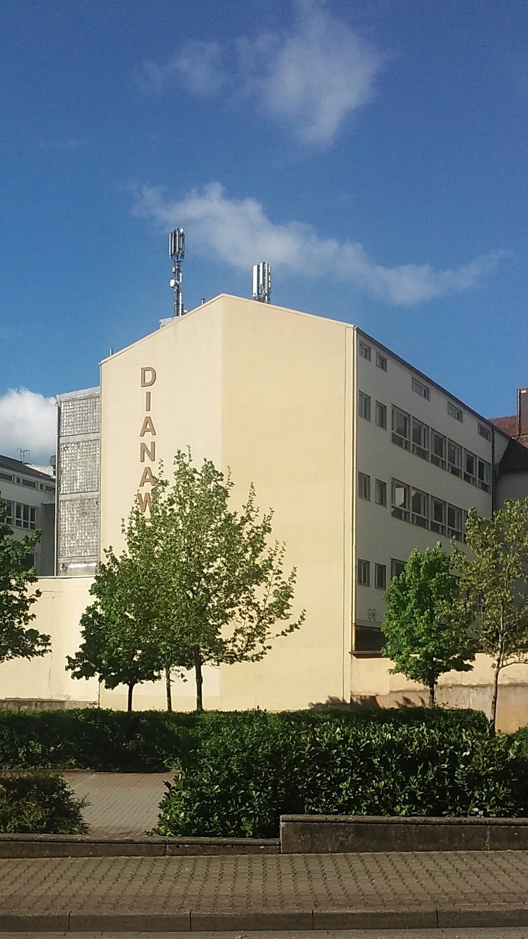 Dianawerk der DIANA Mayer & Grammelspacher GmbH & Co.KG in Rastatt. Die Produktion von Druckluft- und Kleinkaliberwaffen am Standort in Rastatt wurde eingestellt.